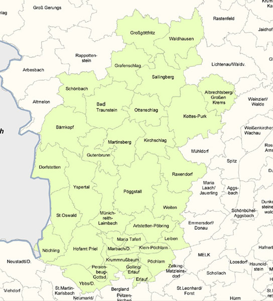 Karte der Leaderregion Südliches Waldviertel - Nibelungengau, markierte Gemeinden sind Mitgliedergemeinden